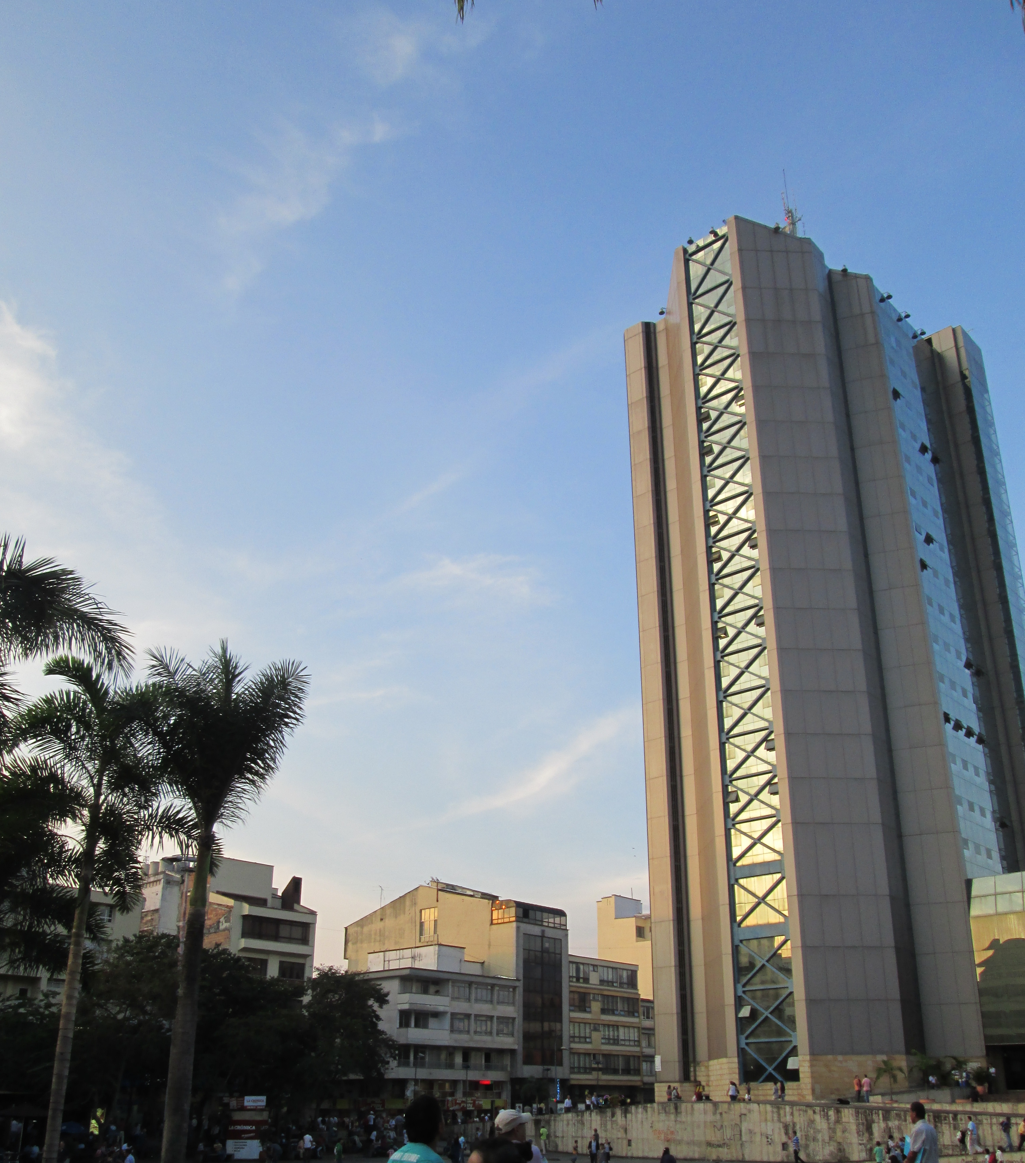 Edificio Gobernación del Quindío, en la Plaza de Bolivar de Armenia.